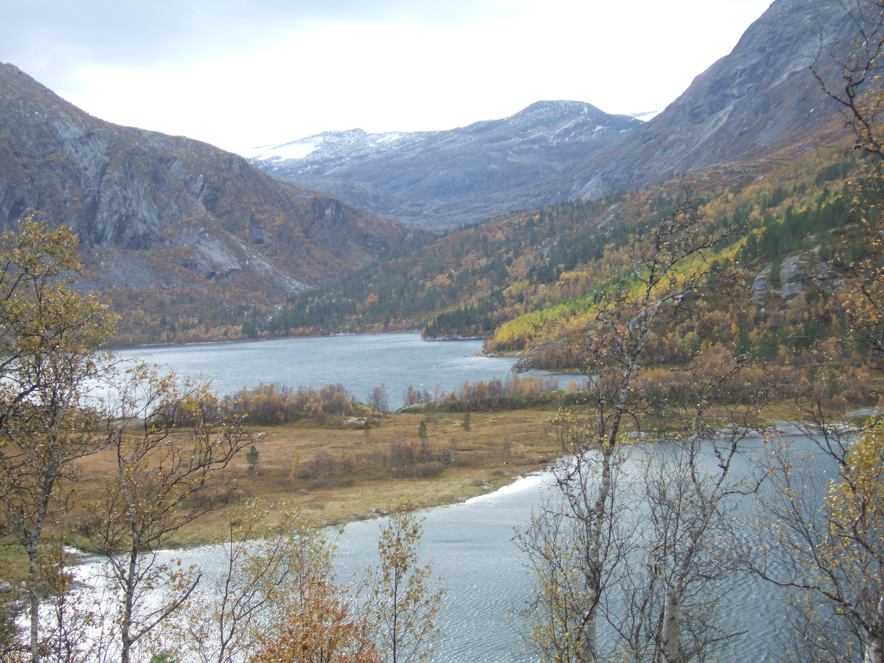 Heimste Kaldhussætervatnet, Nordal